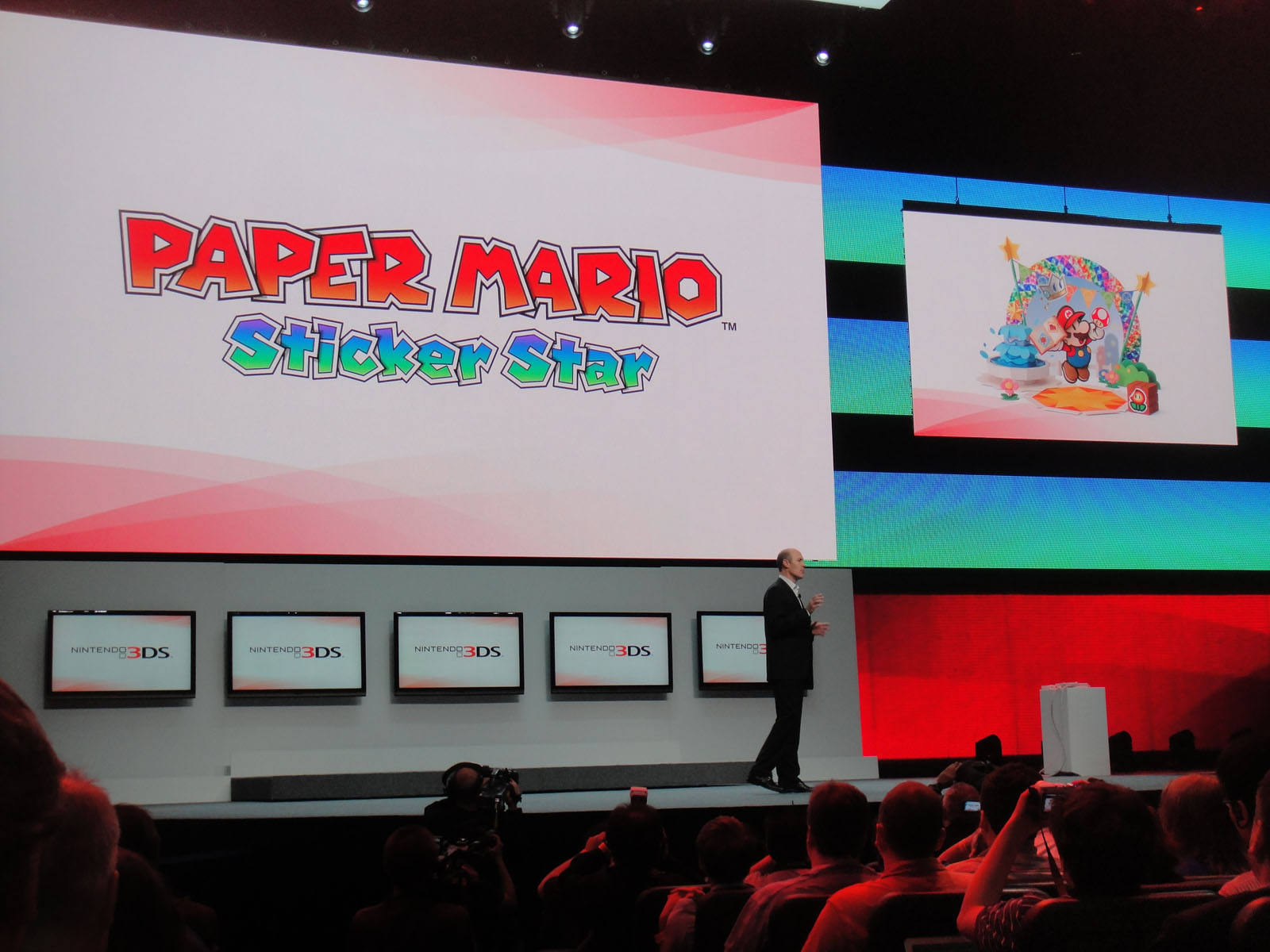 E3 Expo 2012 - Nintendo Press Event